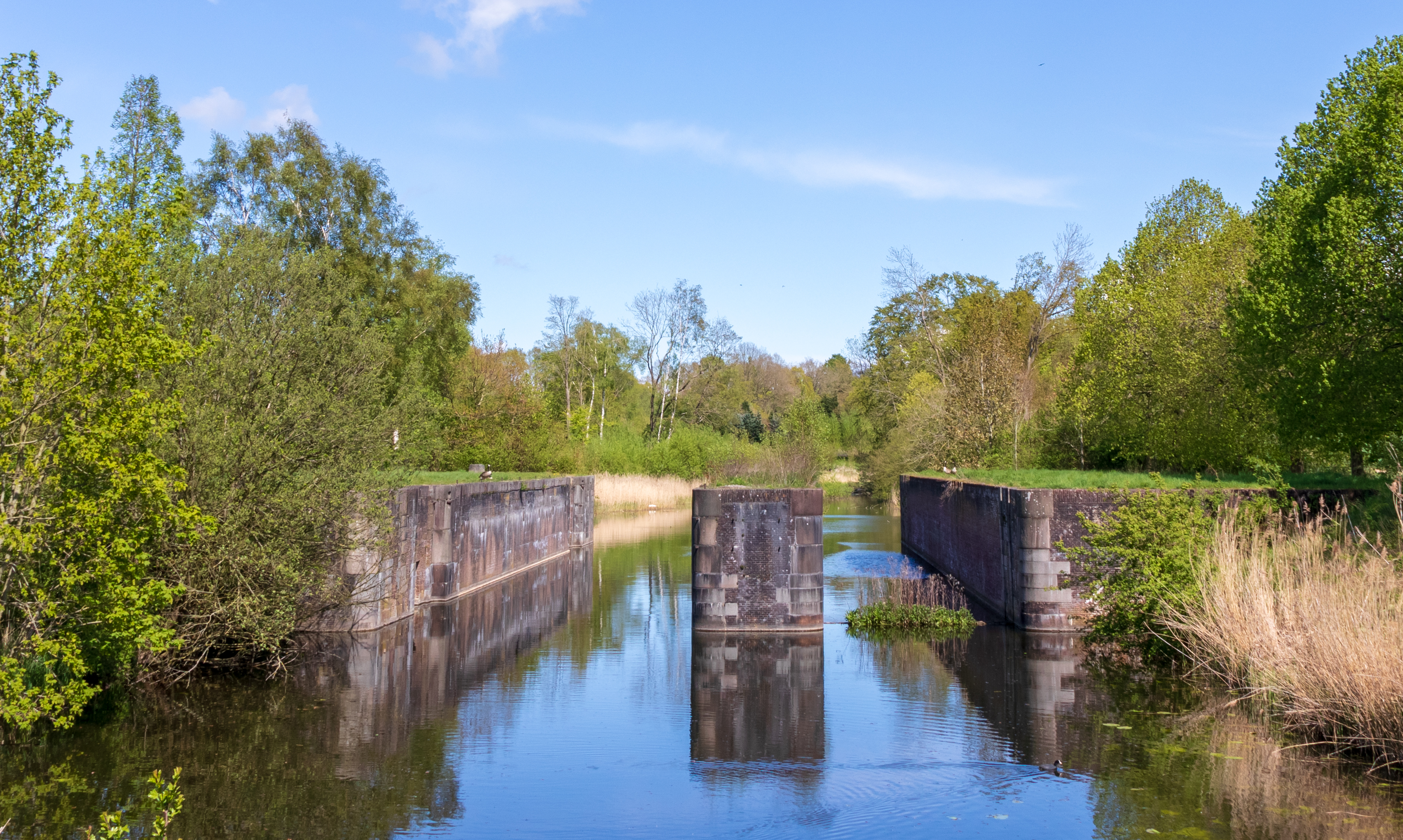 Die Rathmansdorfer Schleuse am ehemaligen Eiderkanal.